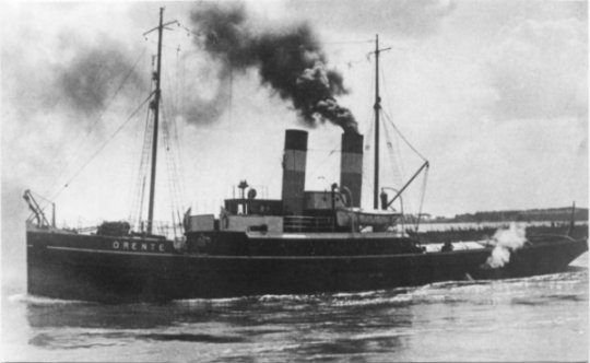 De Drente II van Bureau Wijsmuller (voordien "Hudson" van ISM en daarvoor "Titan" van Zur Mühlen)